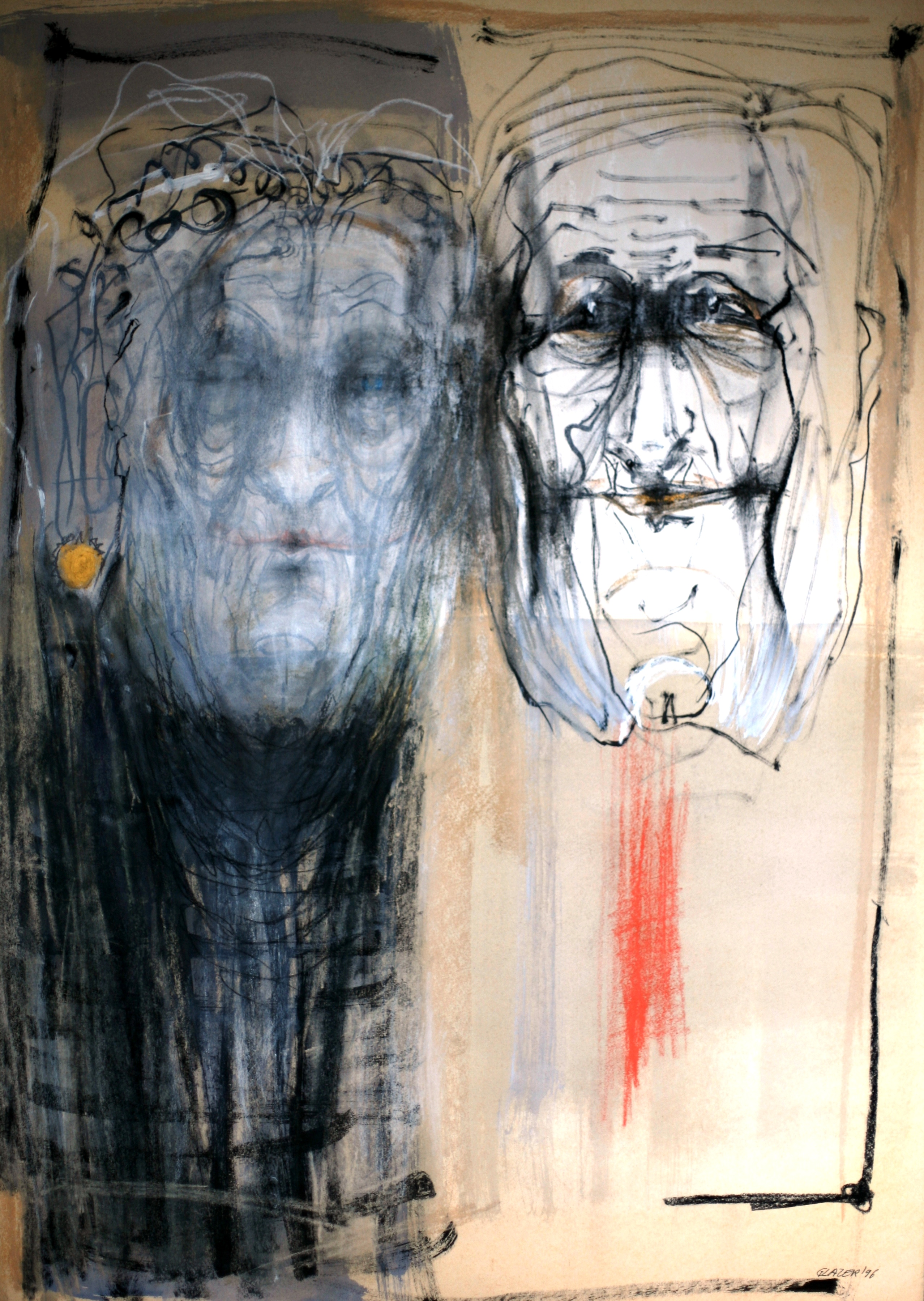 Zofia Glazer, z cyklu: Salon, technika mieszana. Fot. Krzysztof Rudziński